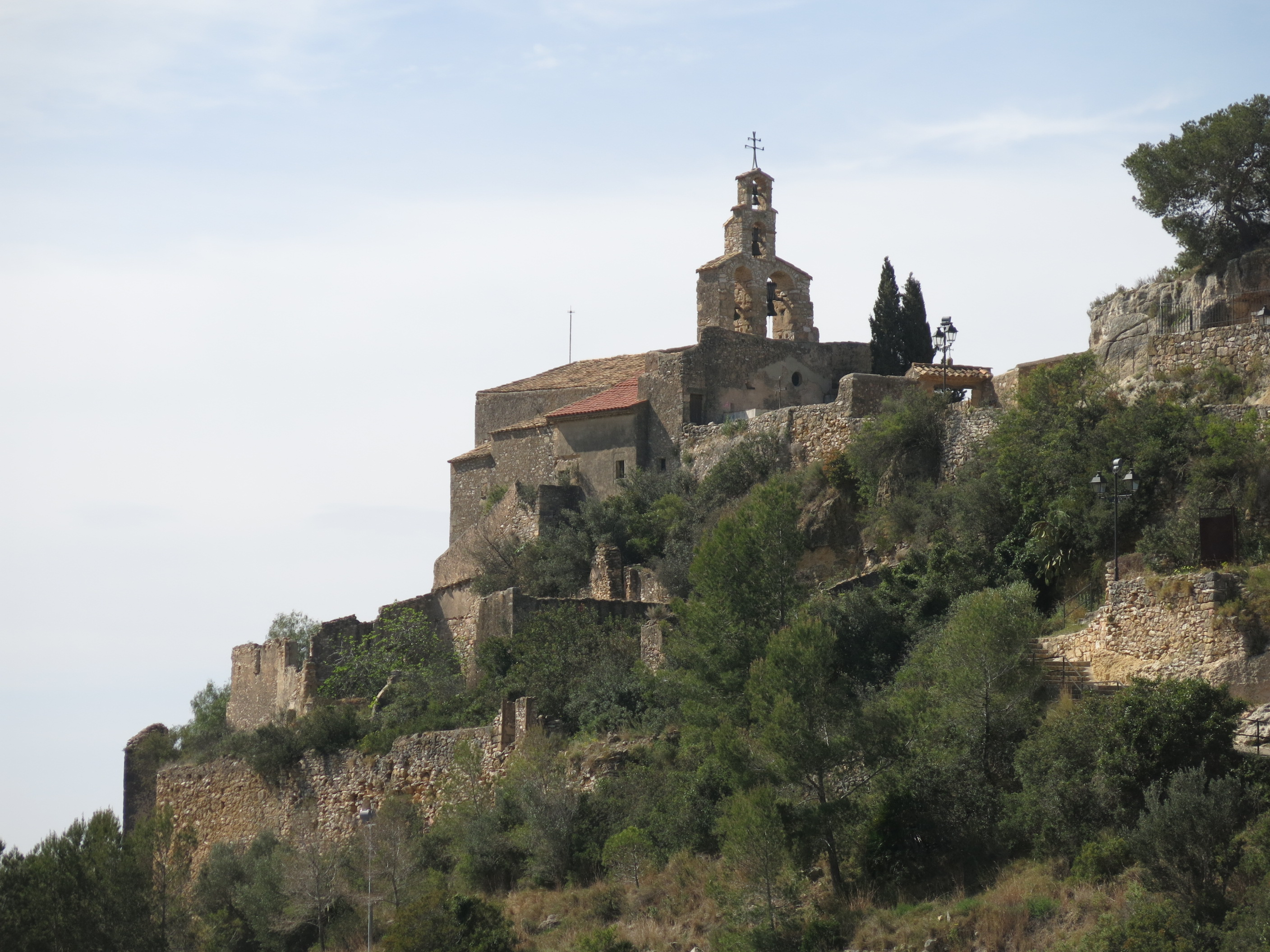 Castell de Vespella (Vespella de Gaià)